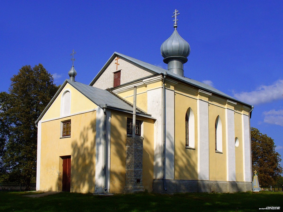 Шумакі. Спаса-Праабражэнская царква